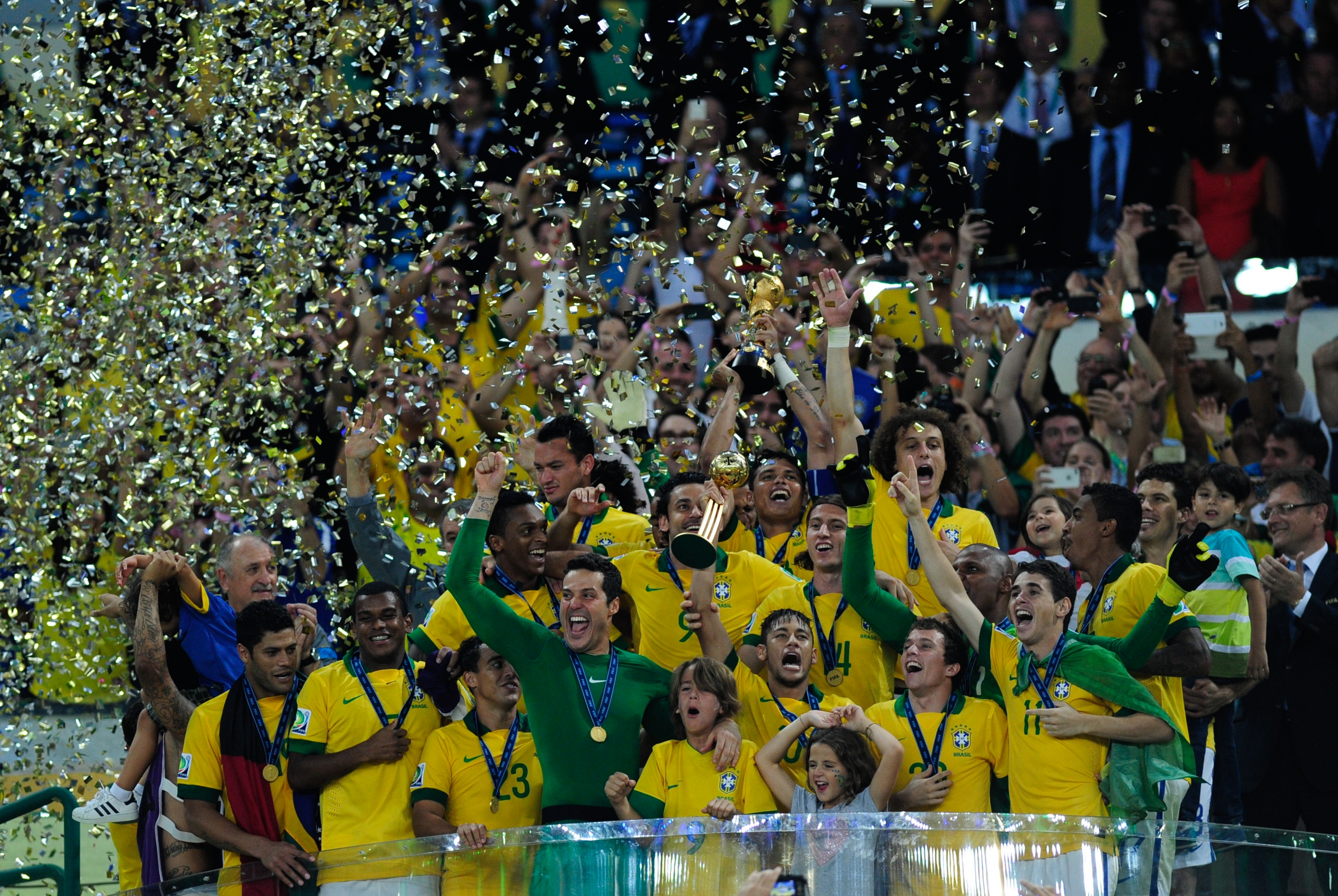 No Estádio do Maracanã, Brasil e Espanha disputam a taça da Copa das Confederações de 2013.